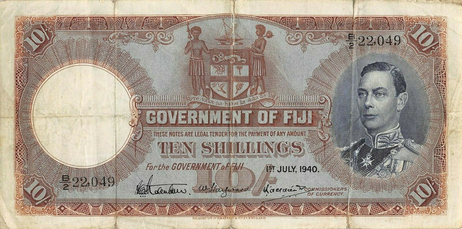 Papírpénz.